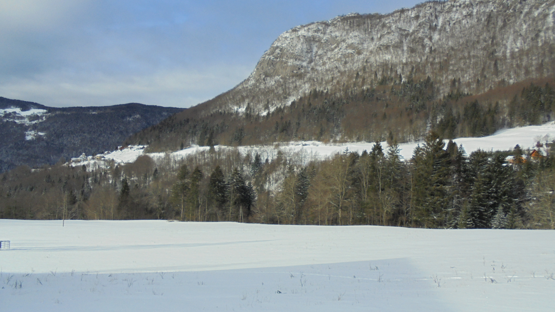 Vue hivernale sur la vallée et le village de Corbel. Photo prise le 26.01.2019.